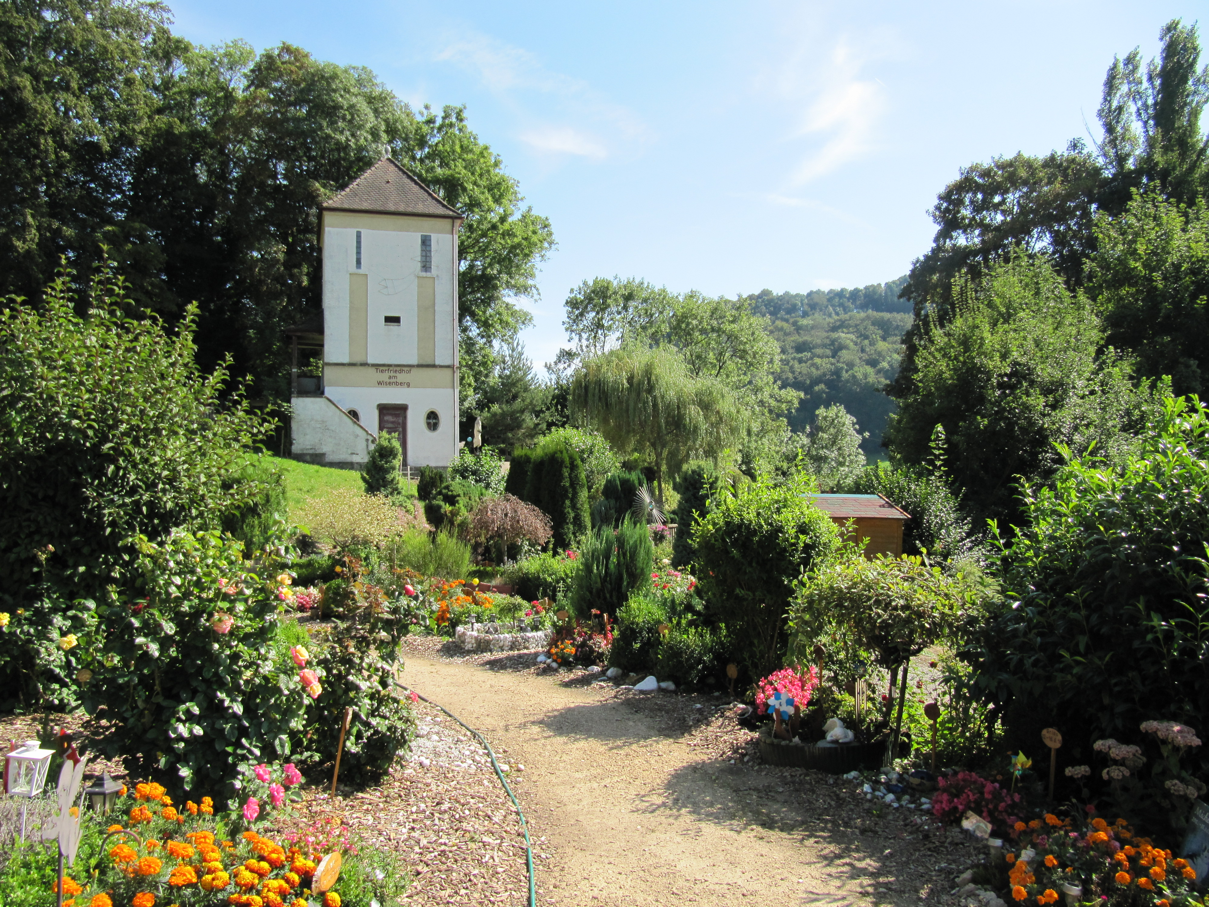 Tierfriedhof am Wisenberg, Läufelfingen BL, erster Tierfriedhof der Schweiz (2001 gegründet), im Hintergrund: altes Tranformatorenhaus mit Turmstübli/Aufbahrungsraum